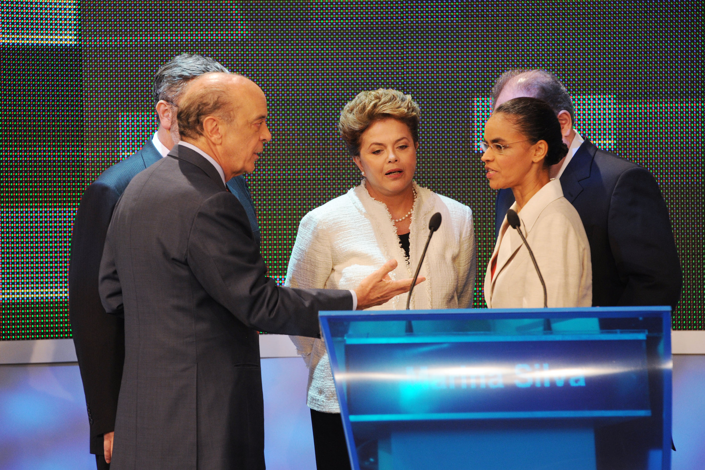 José Serra participa do debate presidencial na TV Band. São Paulo. SP 05/08/2010 Foto Cacalos Garrastazu/ObritoNews